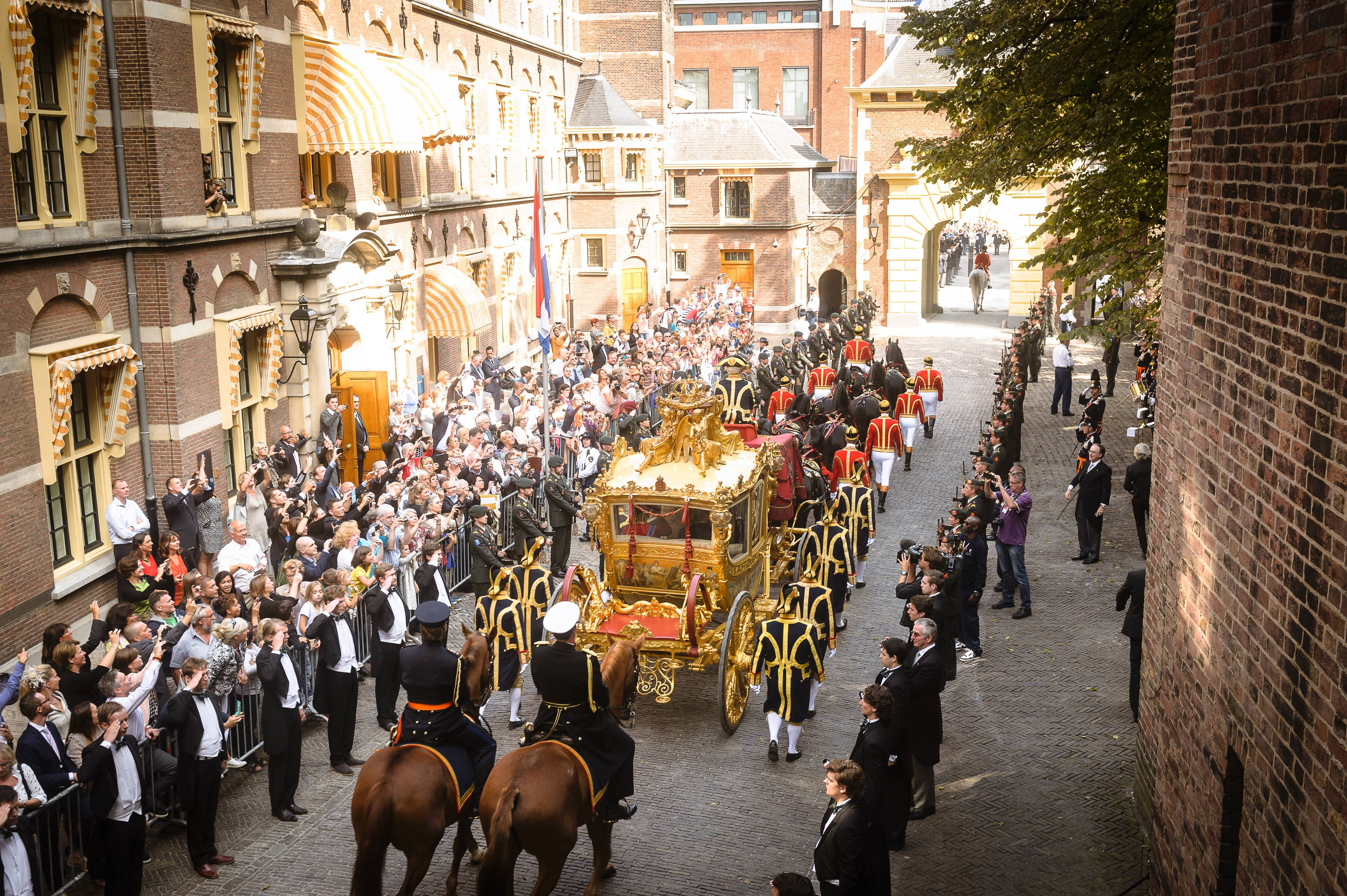 Gouden Koets vertrekt op Prinsjesdag 2014